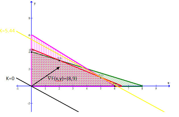 Resolució gràfica del mètode 3.